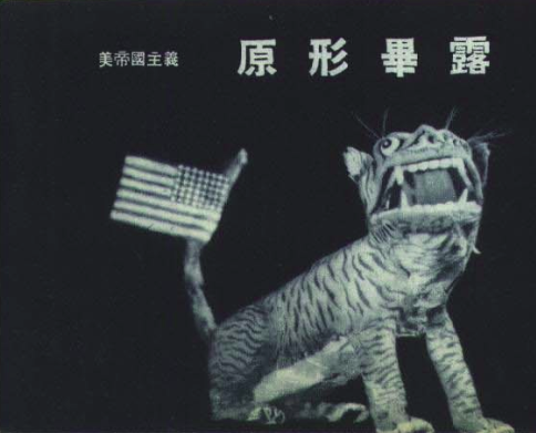 被称为纸老虎的美国，1950年8月的《人民画报》。